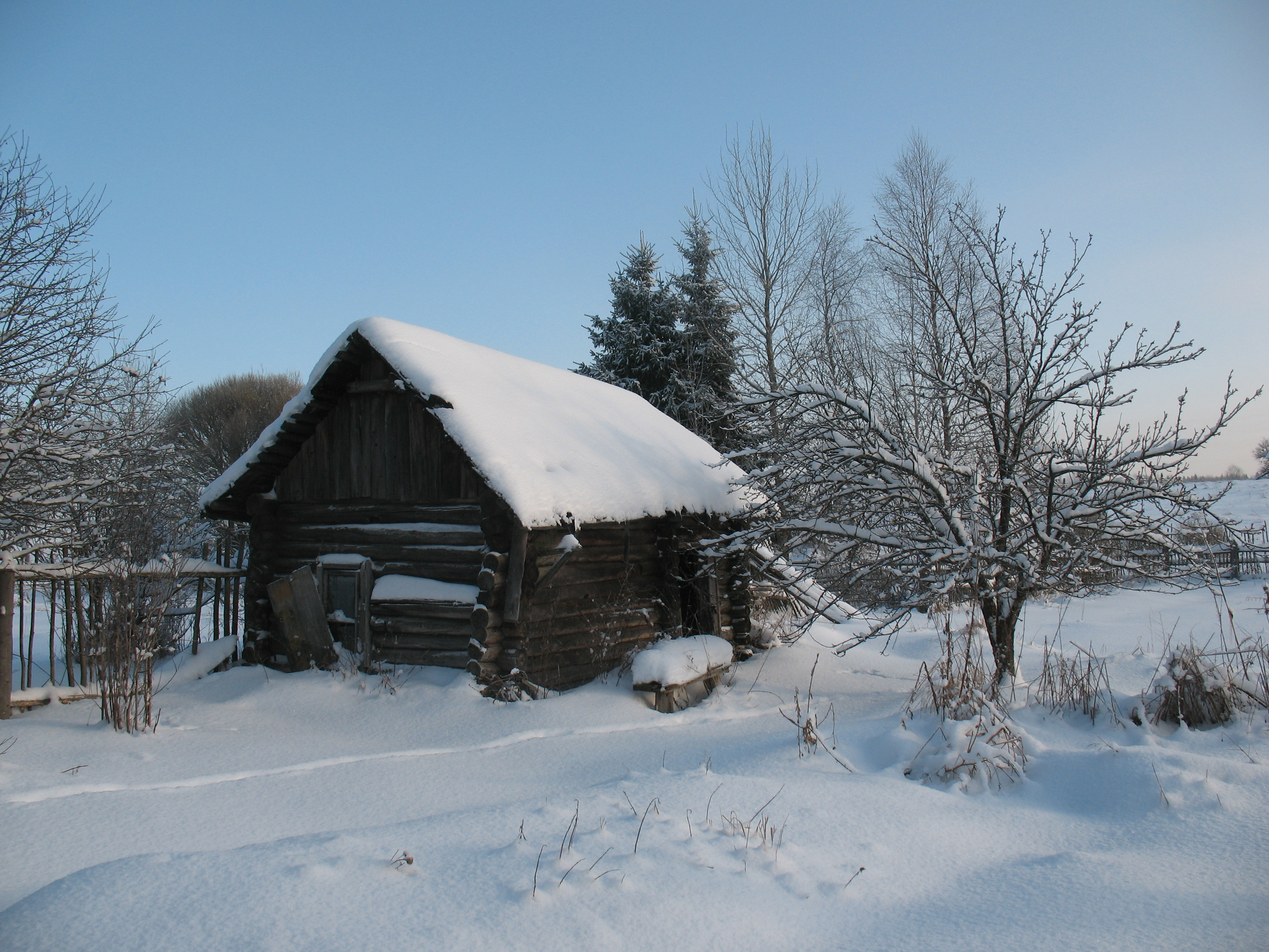 Баня "по черному"